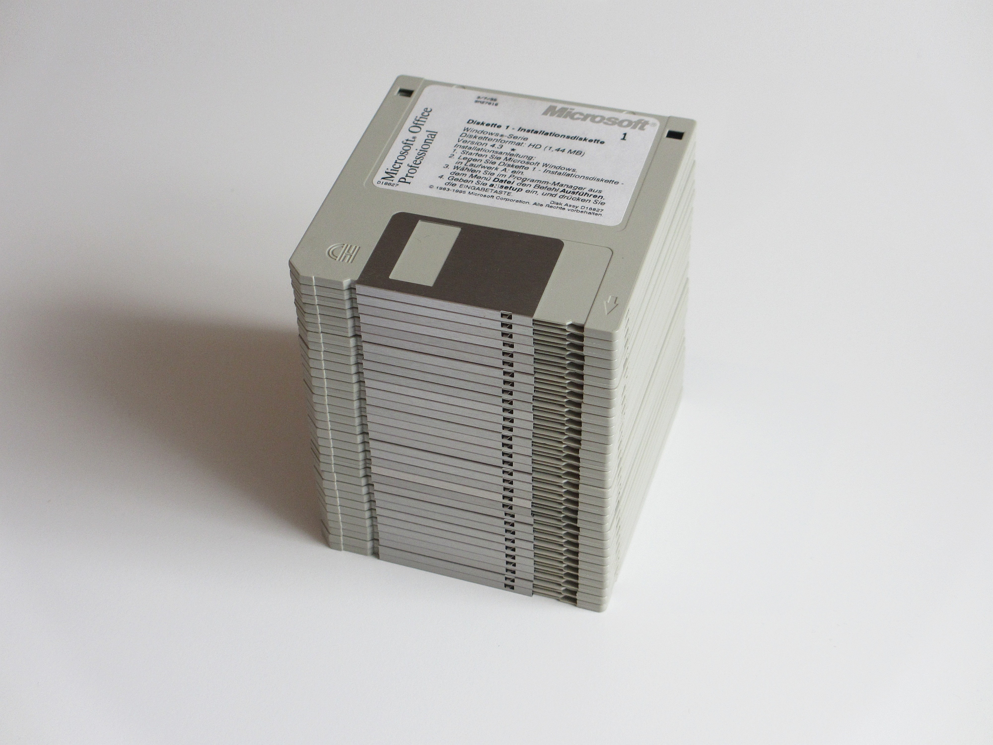 Das ab 1994 erhältliche Office-Paket Microsoft Office Professional 4.3 (deutschsprachig) auf insgesamt 32 Installationsdisketten